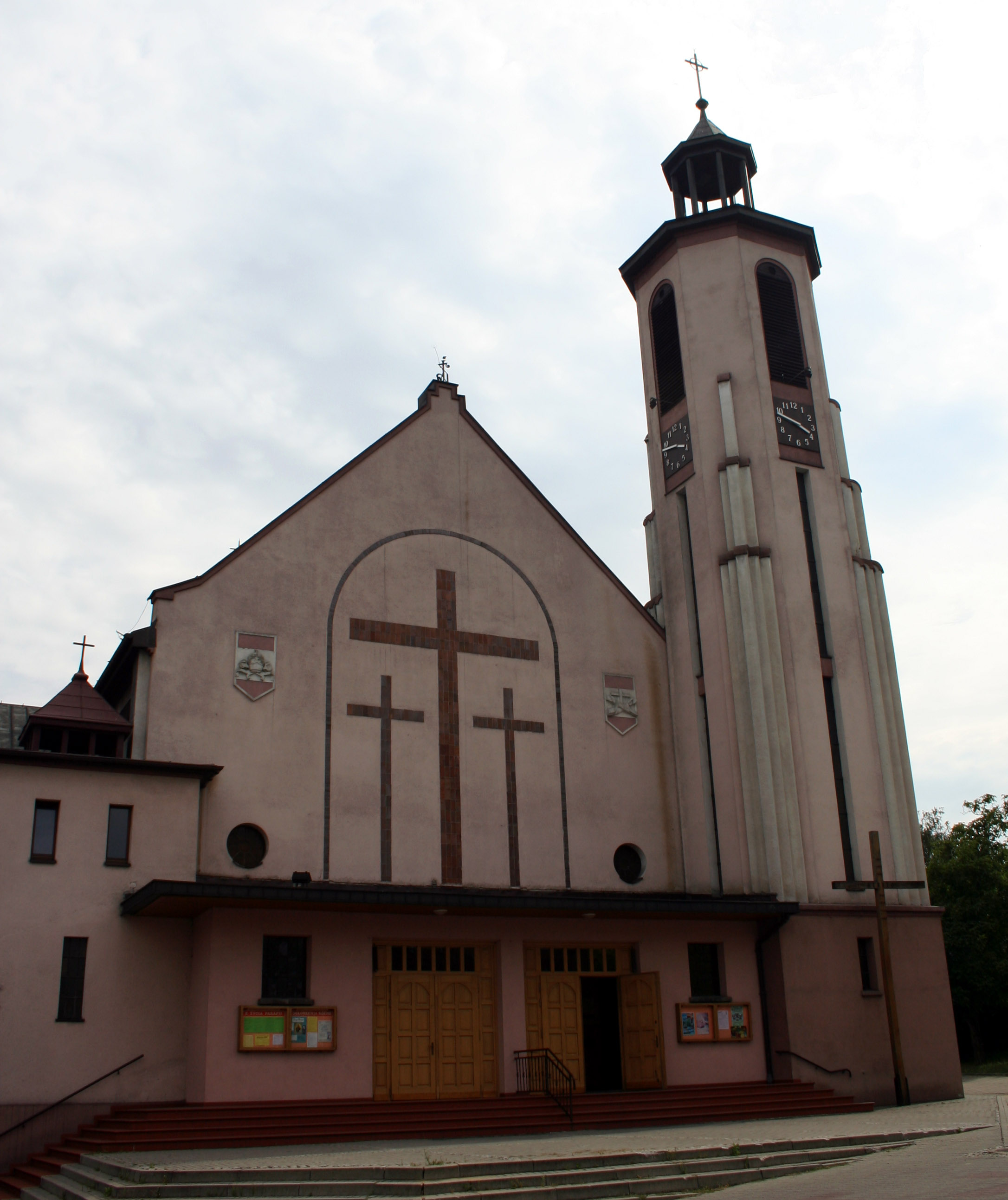 Kościół św. Józefa Robotnika w Rybniku